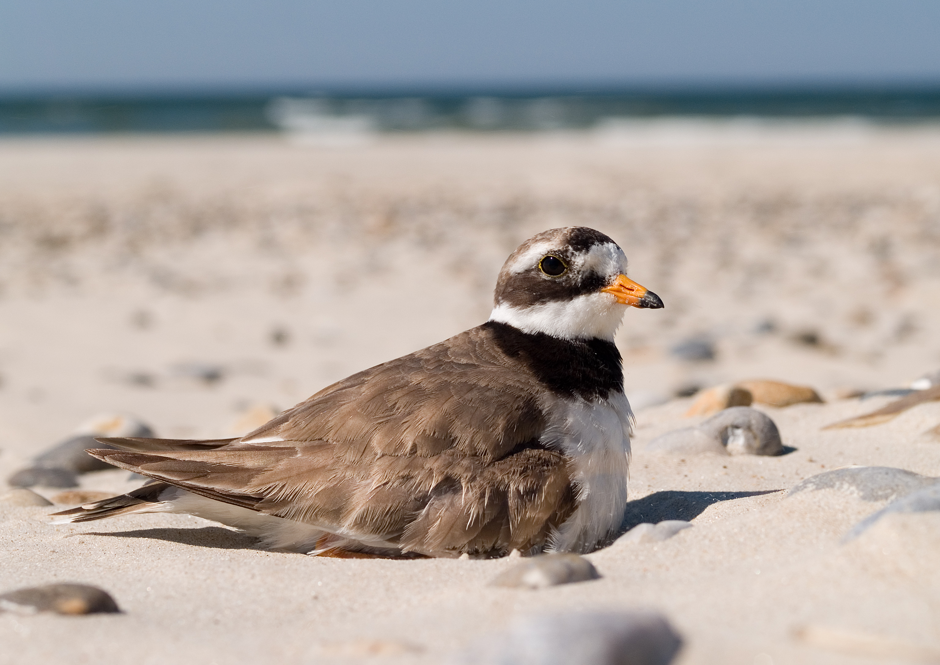 Charadrius hiaticula - Sandregenpfeifer, brütend, in Nordjütland (DK) am Nordseestrand